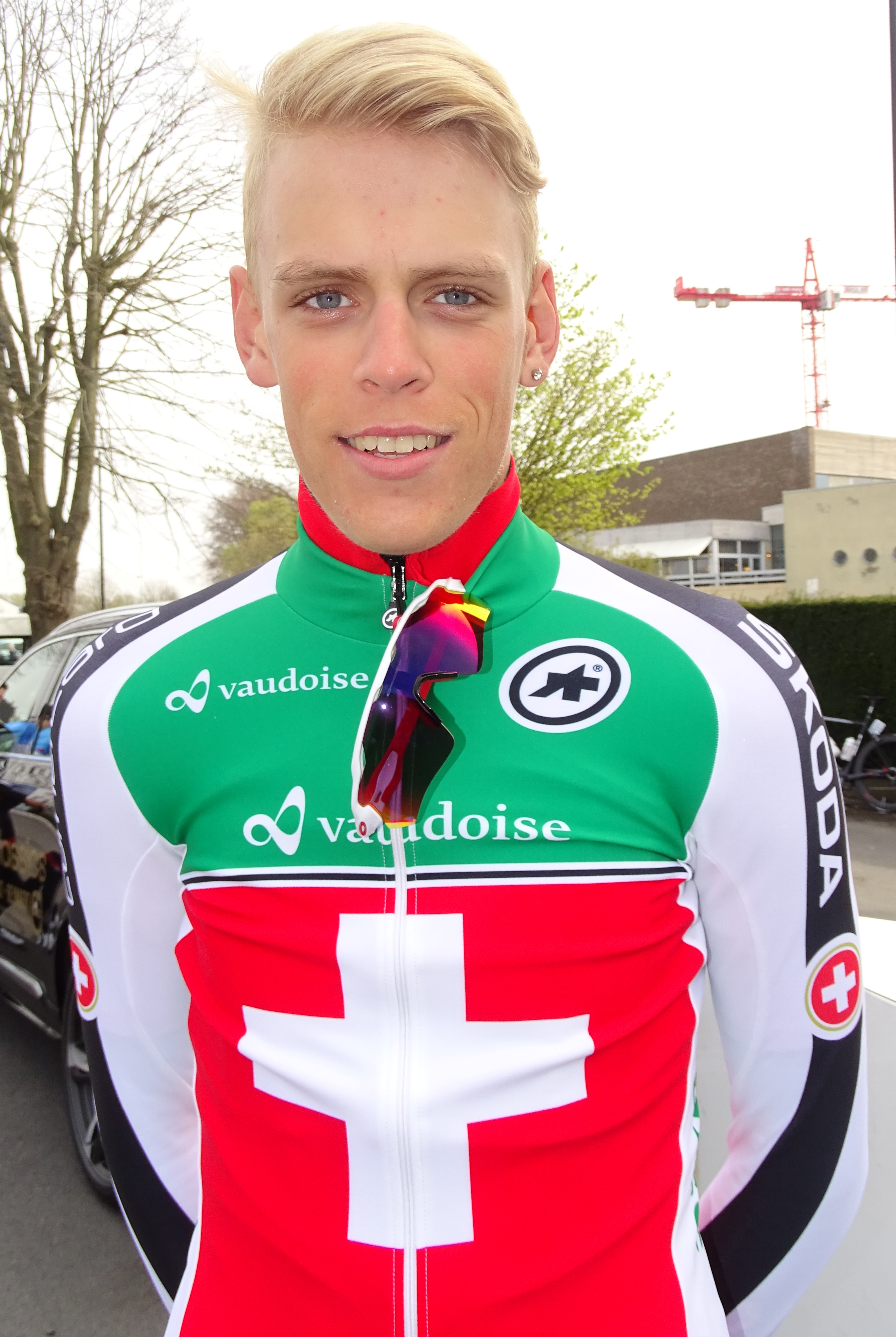 Reportage réalisé le samedi 9 avril à l'occasion du départ et de l'arrivée du Tour des Flandres espoirs 2016 à Audenarde, Belgique.